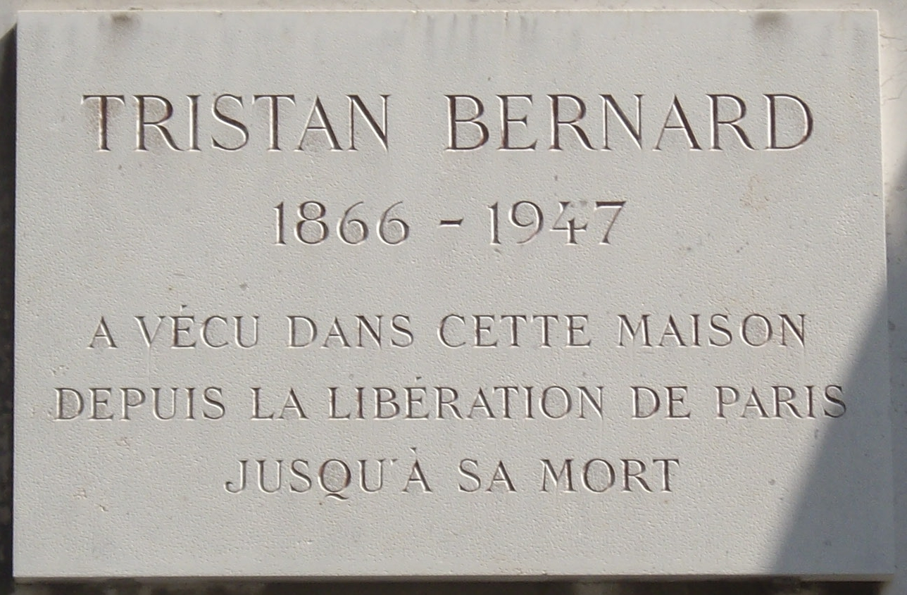 Plaque commémorative, 43 avenue Charles-Floquet, Paris 7e. « Tristan Bernard, 1866-1947, a vécu dans cette maison depuis la libération de Paris jusqu'à sa mort. »